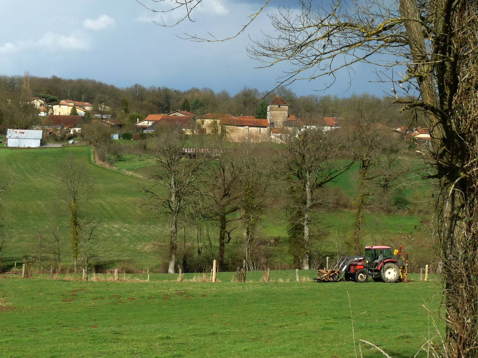 vallée de la Charente, St-Quentin/Charente, France